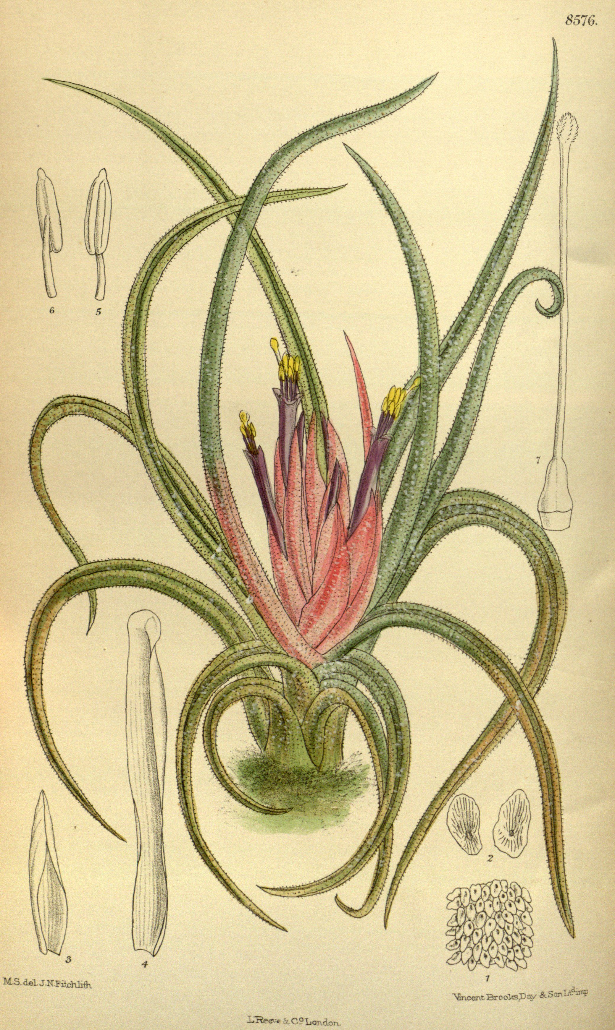 Tillandsia benthamiana var. andrieuxii (= Tillandsia andrieuxii), Bromeliaceae